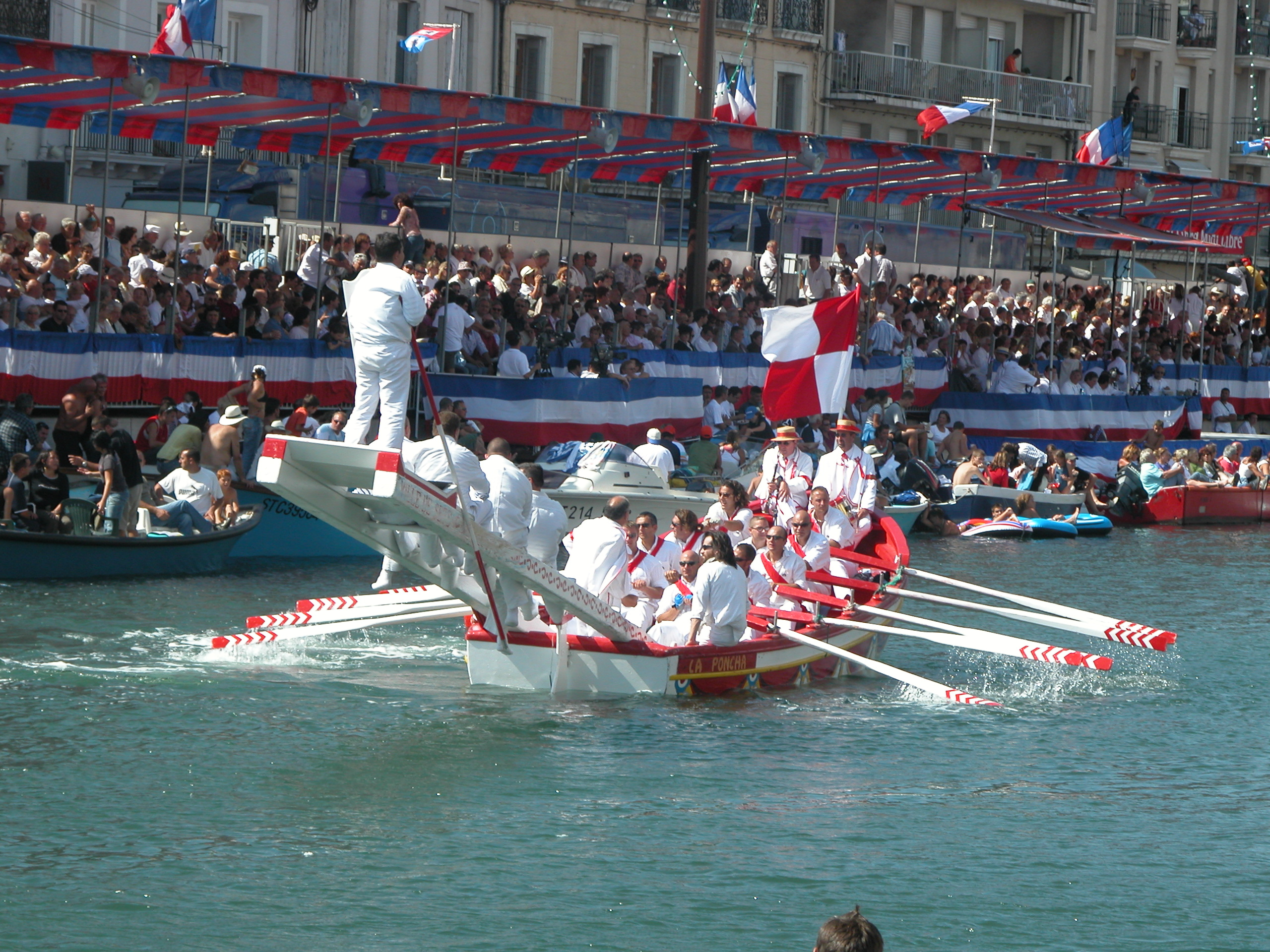 Joutes de la Saint-Louis 2005 - Photo personnelle.